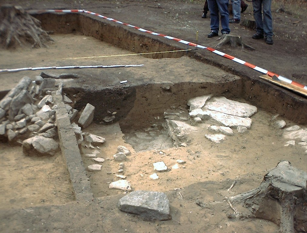 Mittelberg – Fundort der Himmelsscheibe von Nebra, sehr gut ist das mit dunklerer Erde verfüllte Loch der Raubgräber zu sehen.